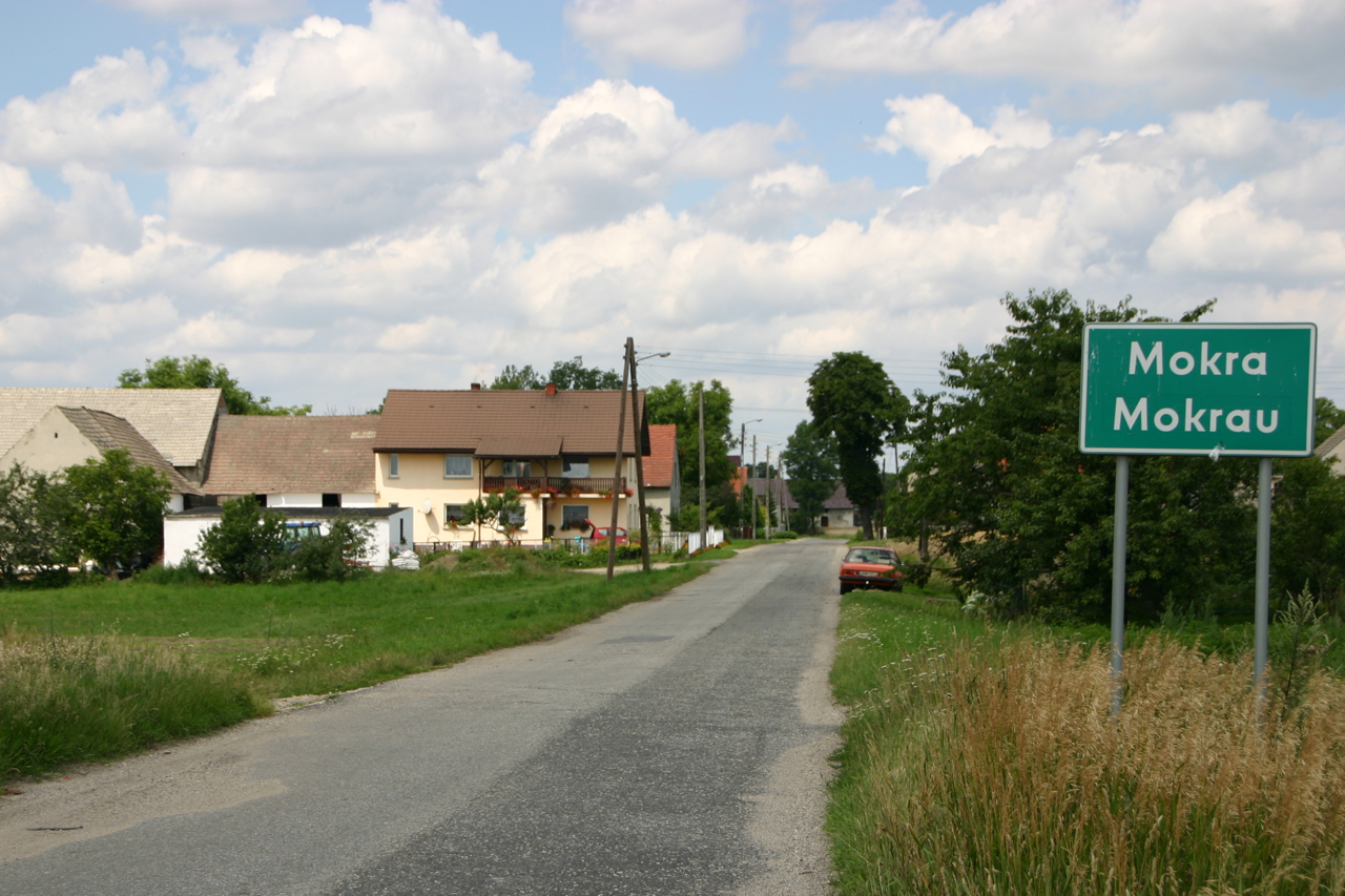 Mokra (dodatkowa nazwa w j. niem. Mokrau) – wieś w Polsce położona w województwie opolskim, w powiecie prudnickim, w gminie Biała.